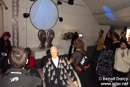 Photos de l'exposition "Pink Floyd Interstellar" à la Cité de la Musique (Porte de la Villette, Paris). Read the story at . Lire le compte-rendu de l'expo sur